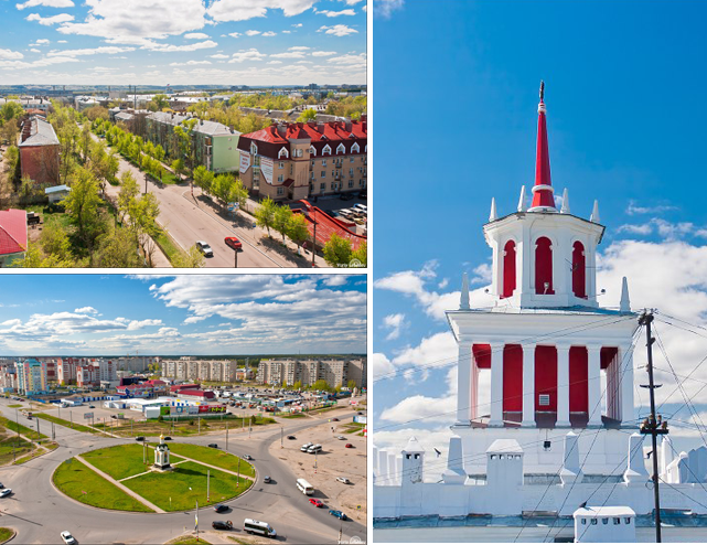 Коллаж для страницы о Дзержинске из фотографий